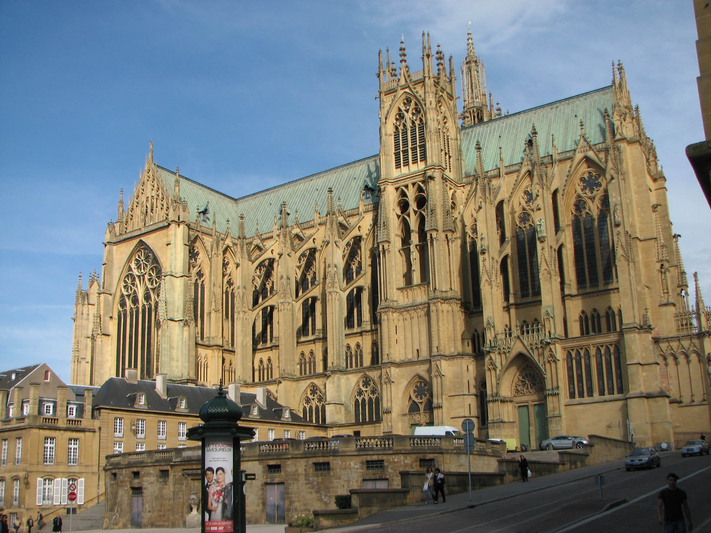 facade ouest de la cathédrale Saint-Étienne de Metz